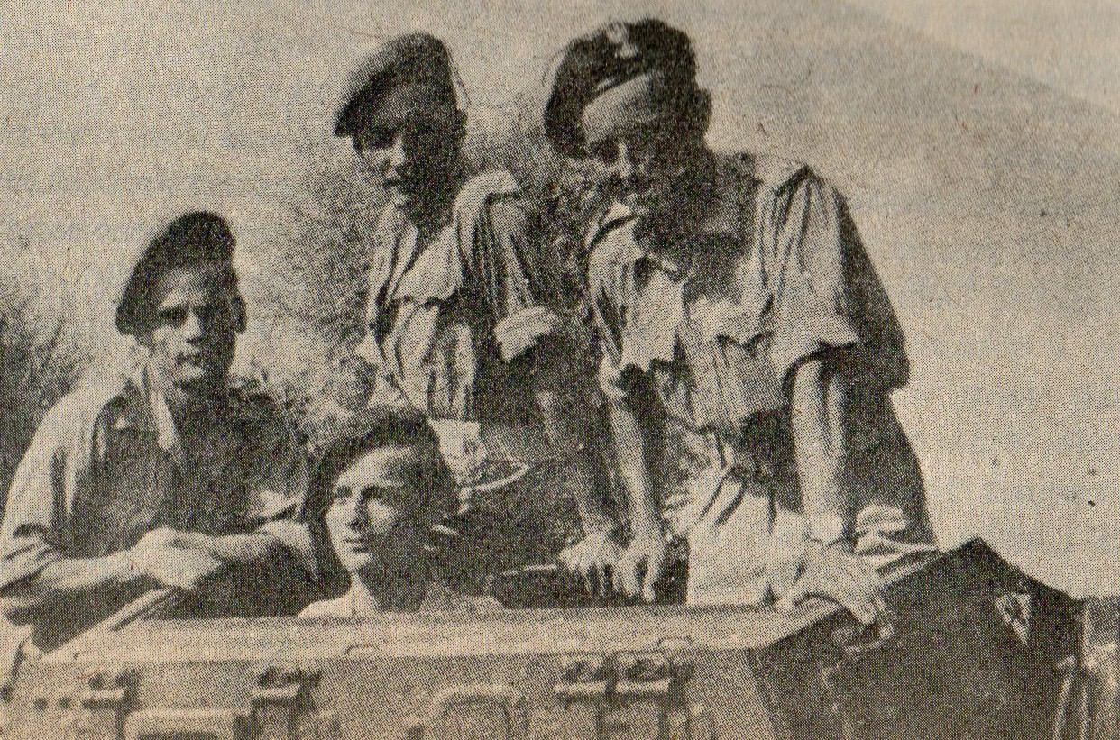 2 Batalion Komandosów Zmotoryzowanych (we włoskiej miejscowości Macerata).